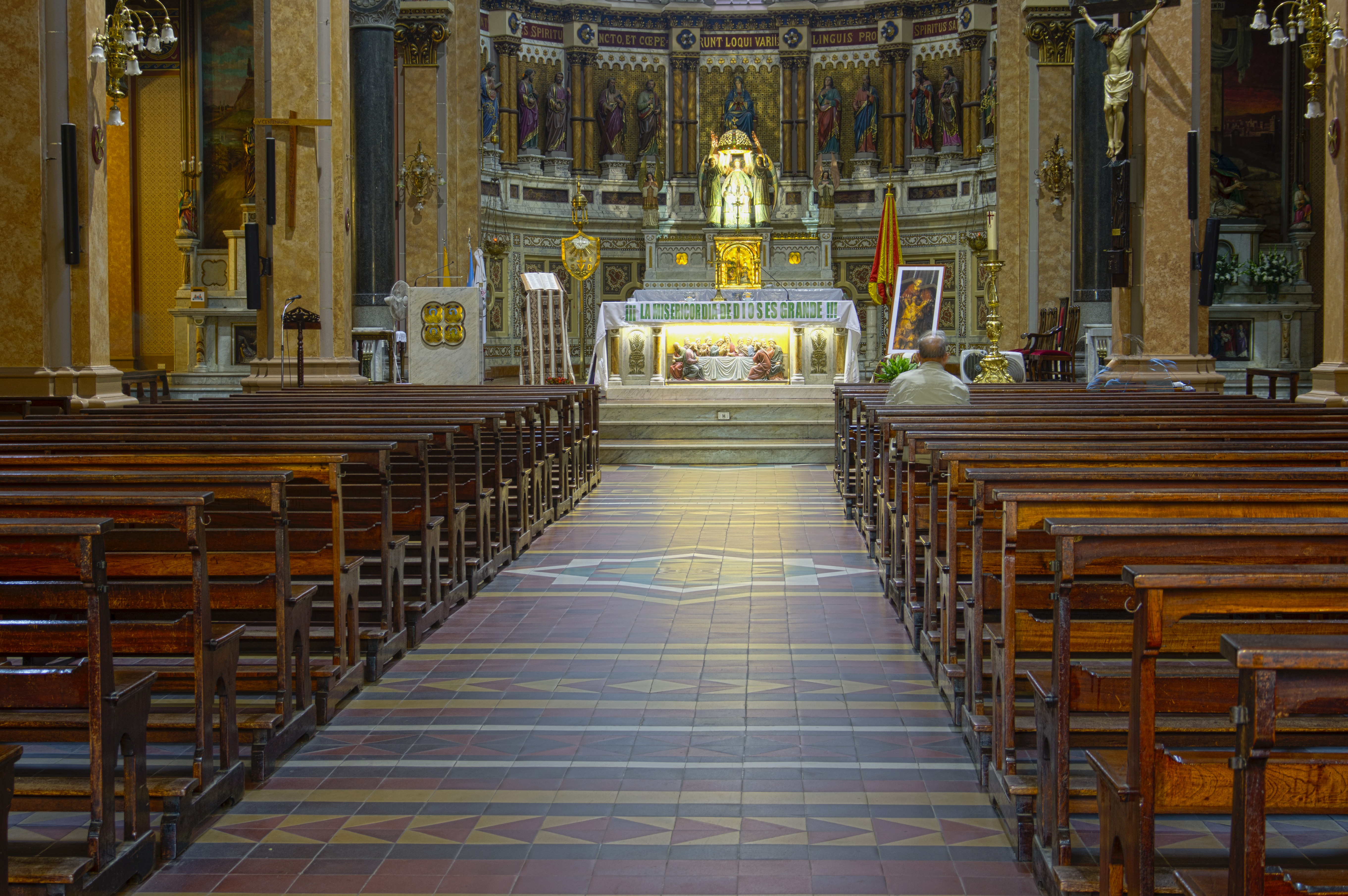 imagen HDR del altar de la Basílica del Espiritú Santo